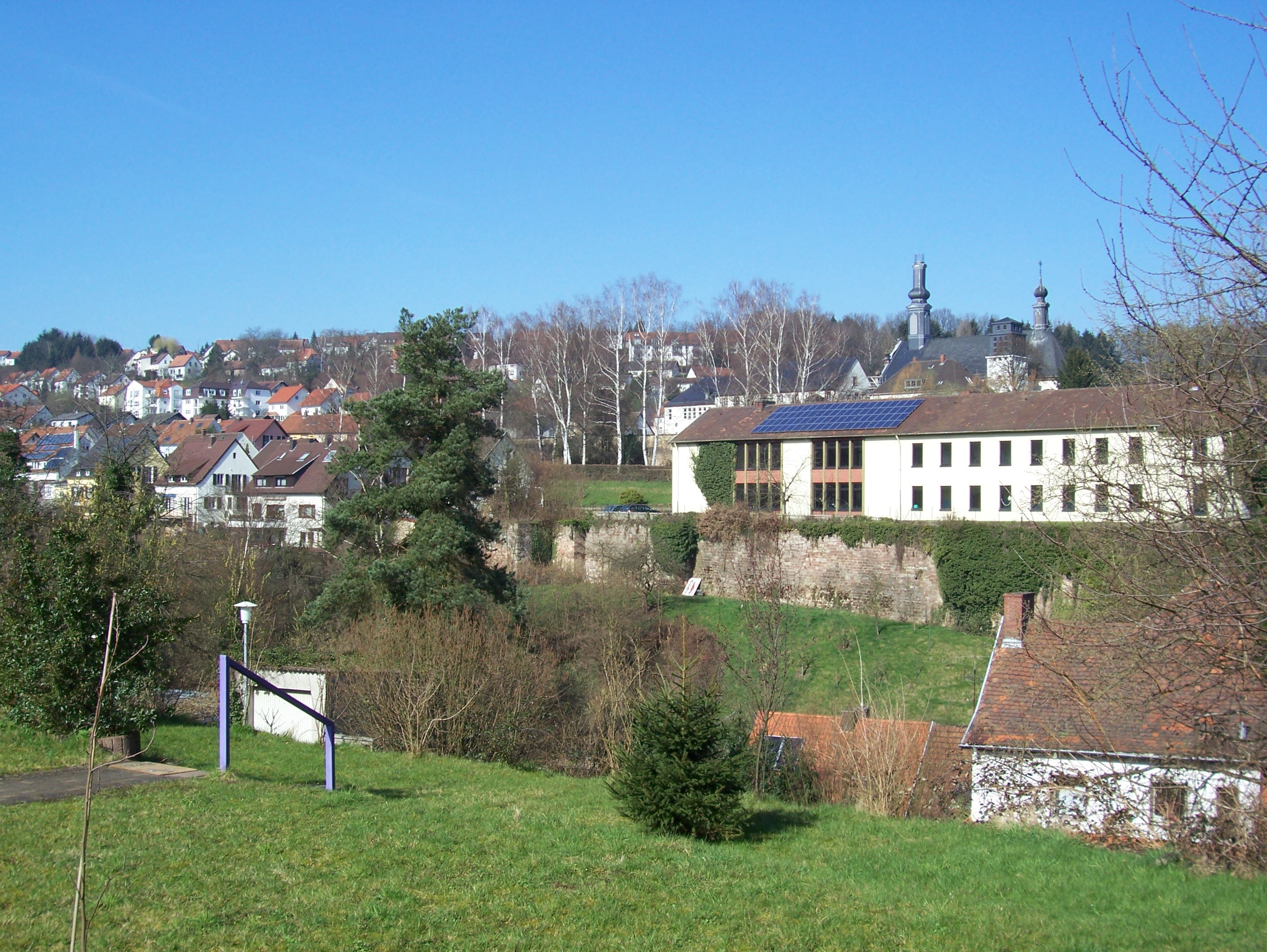 Blick auf den Blieskastler Schlossberg